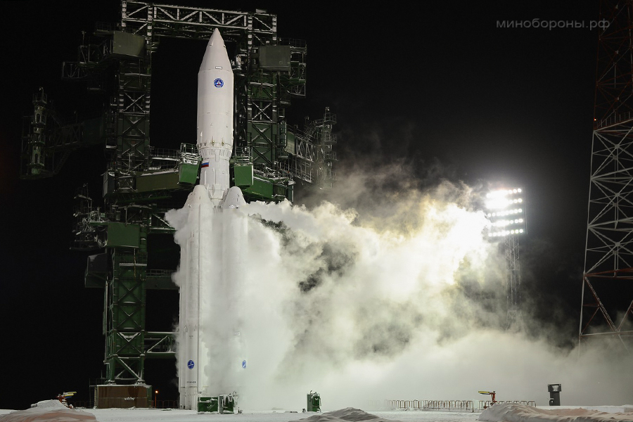 Первый испытательный пуск ракеты-носителя тяжелого класса «Ангара-А5» (космодром Плесецк, Архангельская обл.)